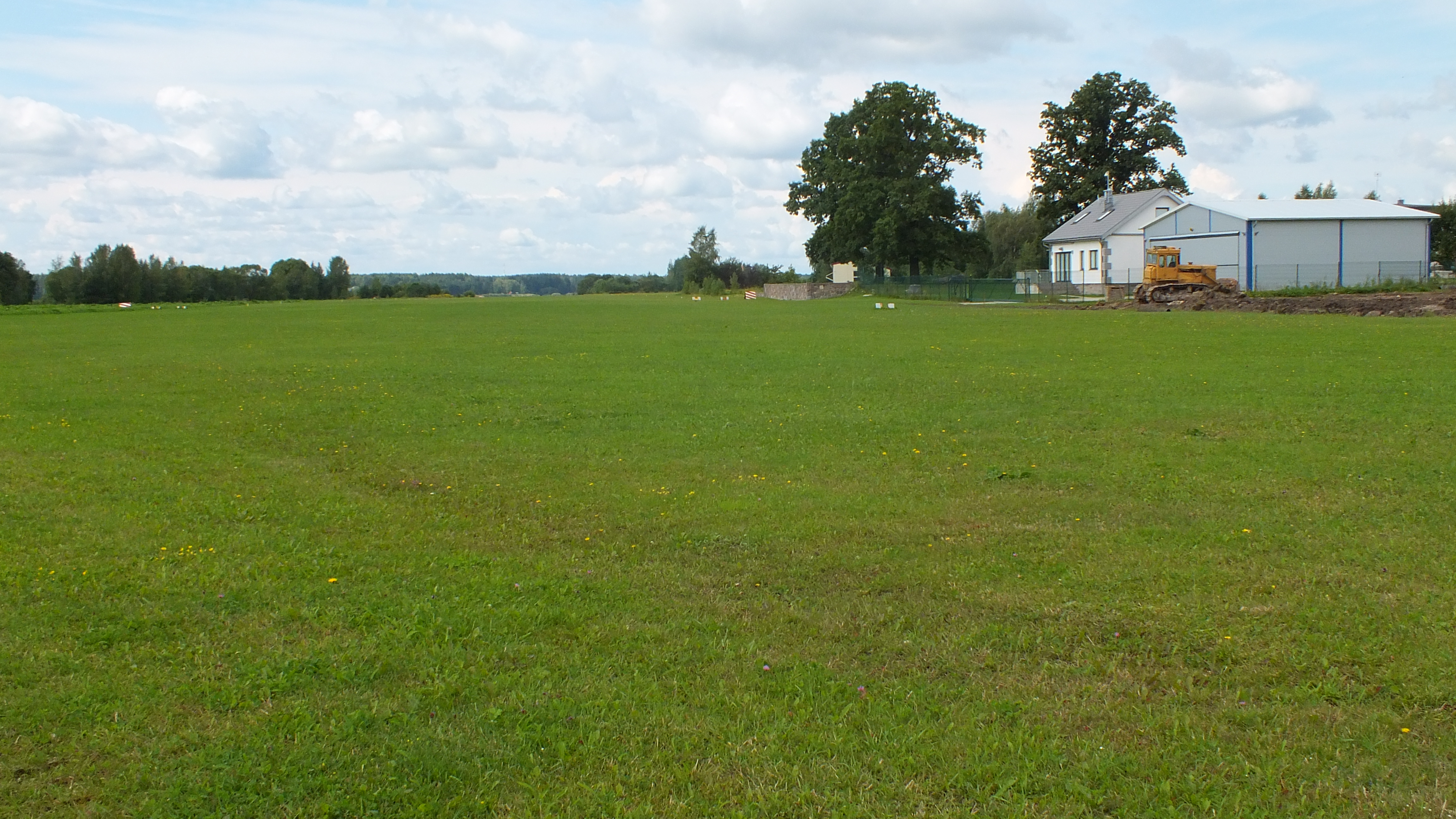 Ikšķiles lidlauka skrejceļš 2